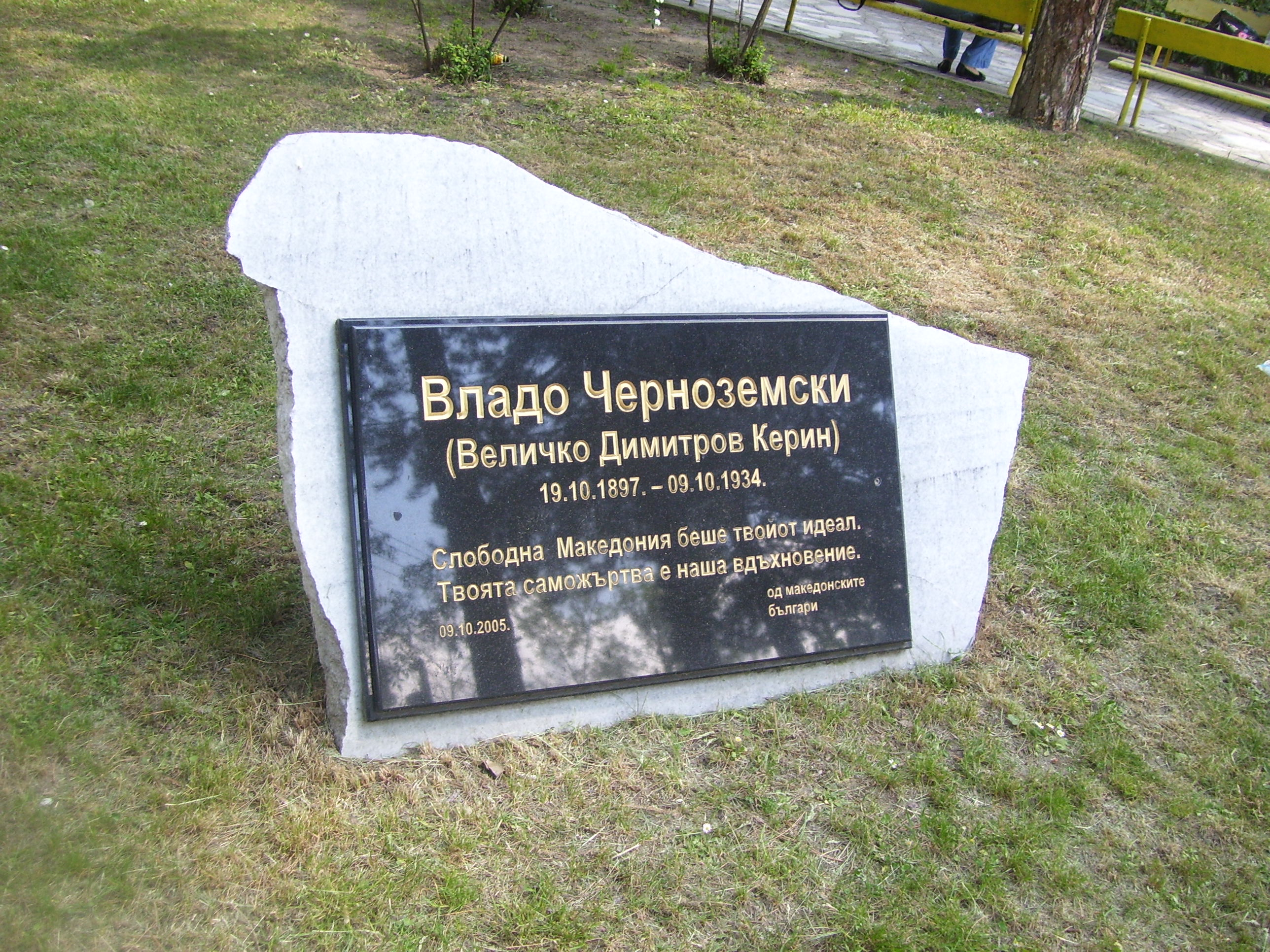 Паметна плоча на Владо Черноземски в родната му Каменица.